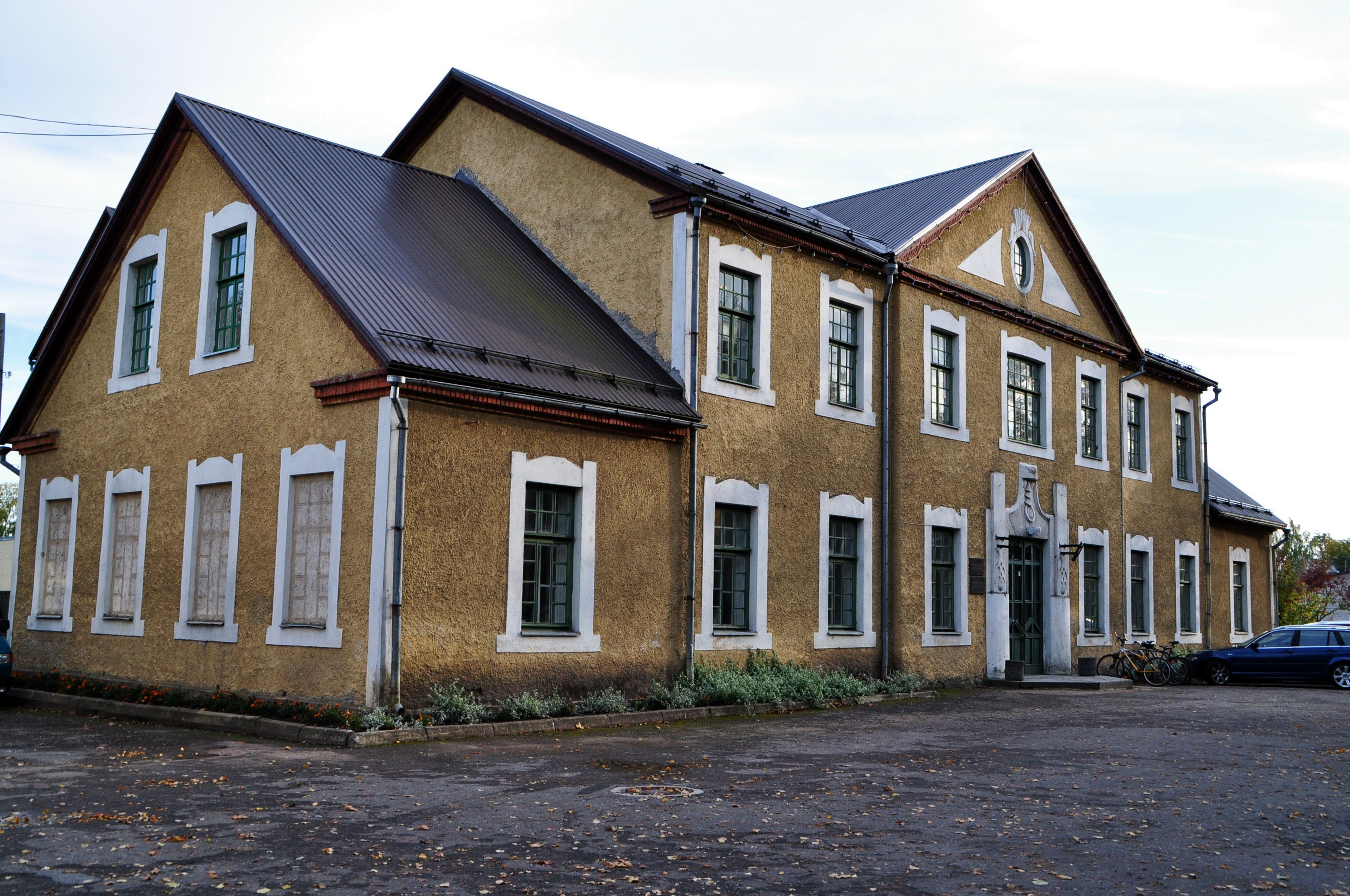 Väike-Maarja seltsimaja